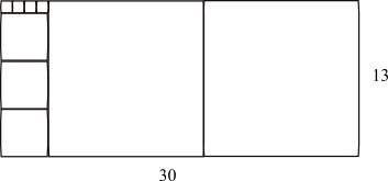 pavage illustrant la création d'un fraction continuée. Image personnelle.